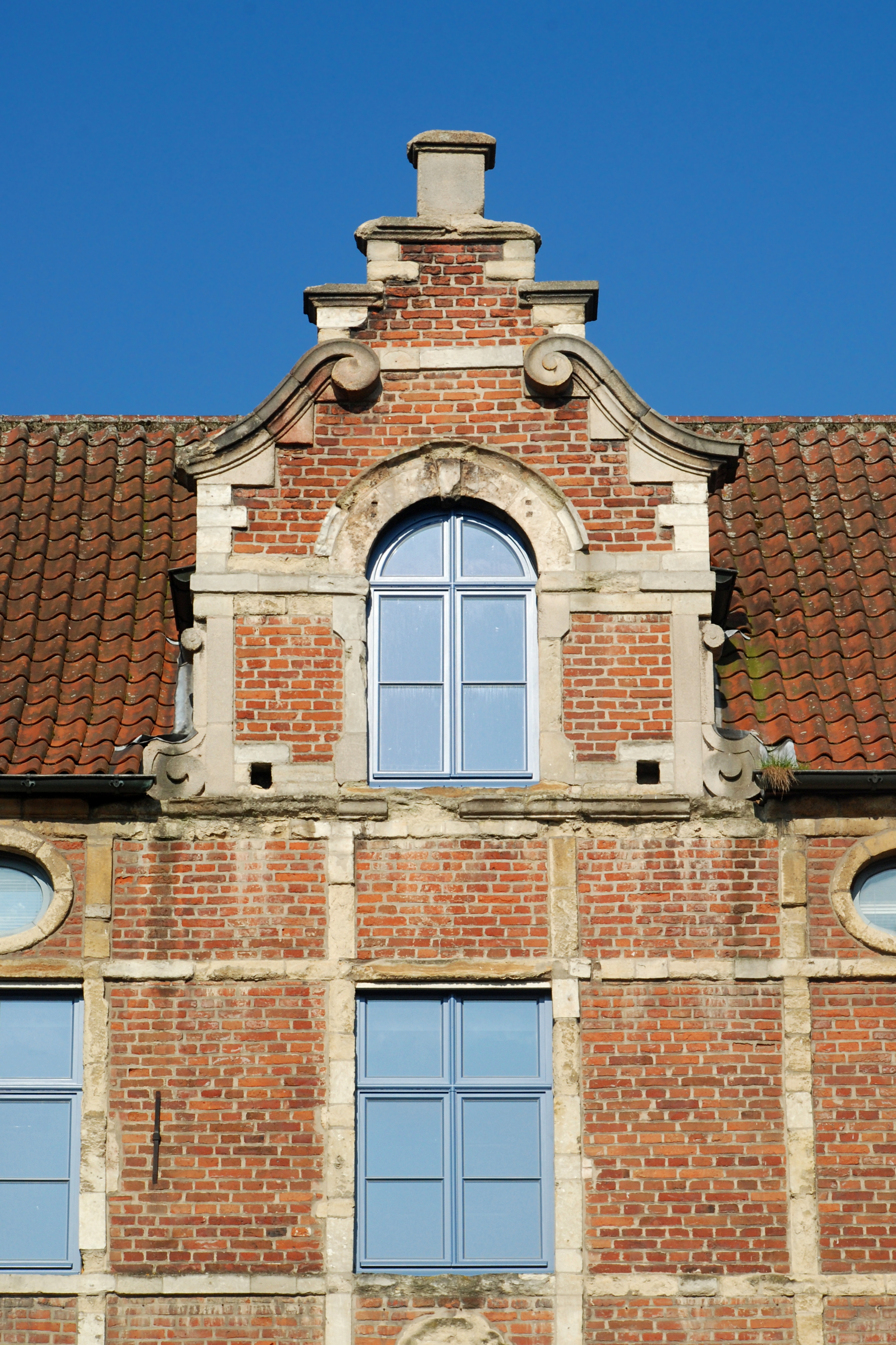 Belgique - Louvain - Brasserie de Jonge Sint-Jacob